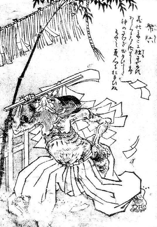 Heiroku (幣六) from the Gazu Hyakki Tsurezure Bukuro (百器徒然袋)